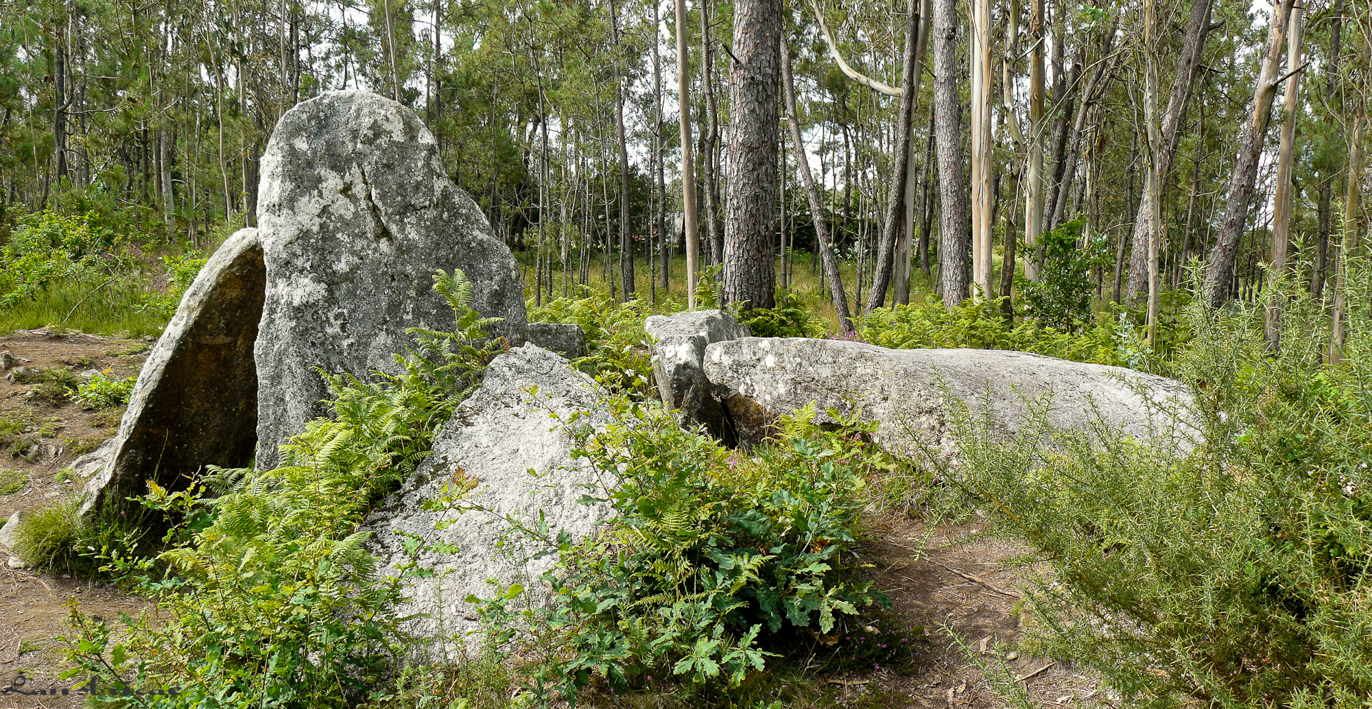 Anta da Pedra Cuberta, Treos, Vimianzo